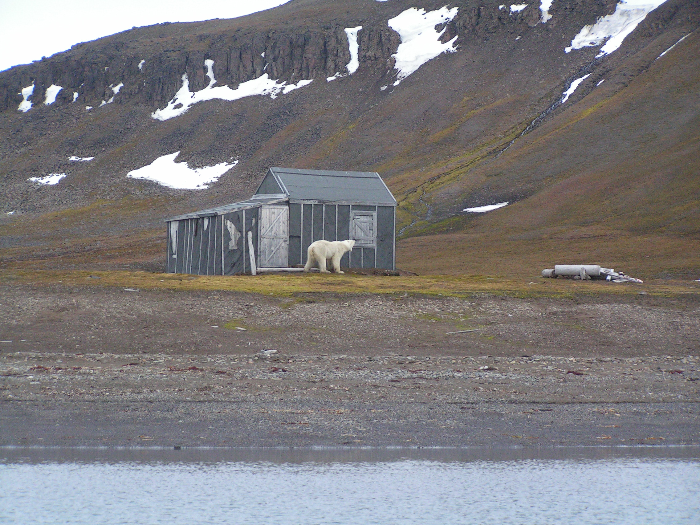 Hut on Barents island, Franken peninsula